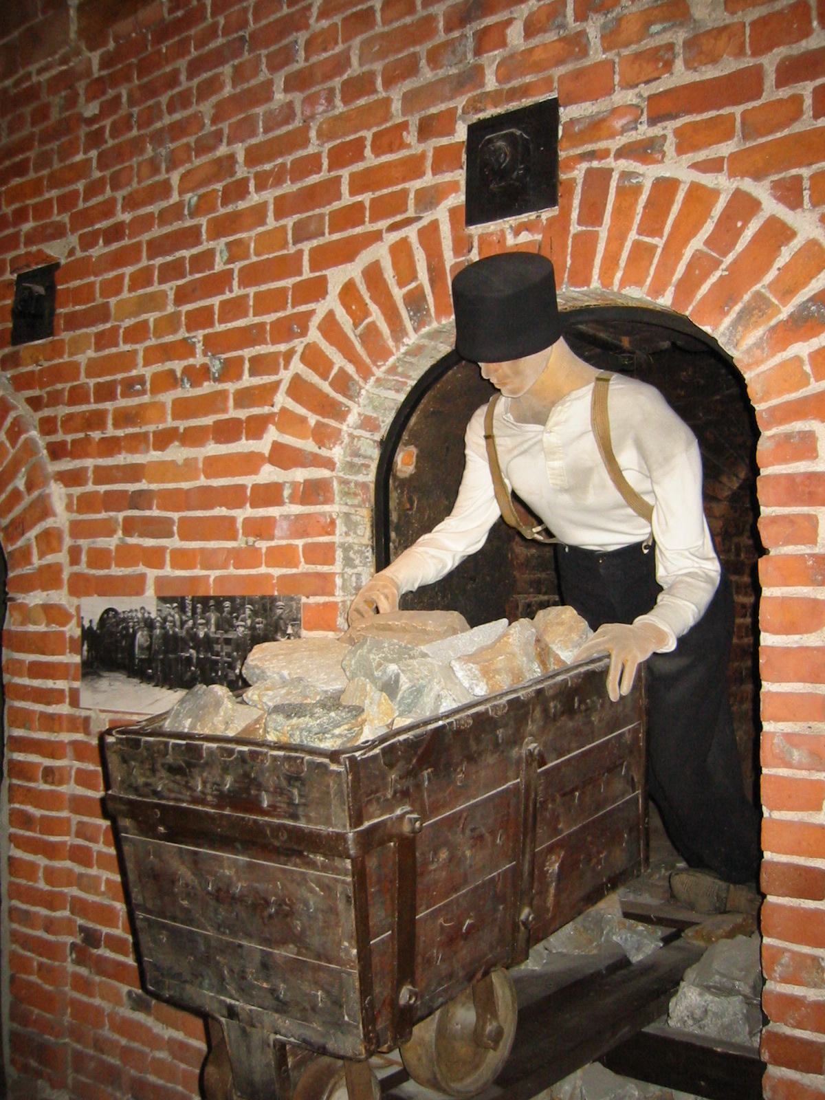 Bergverksmuseet, Kongsberg